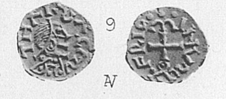 Reproduction d'une monnaie mérovingienne retrouvée à Thésée (41)